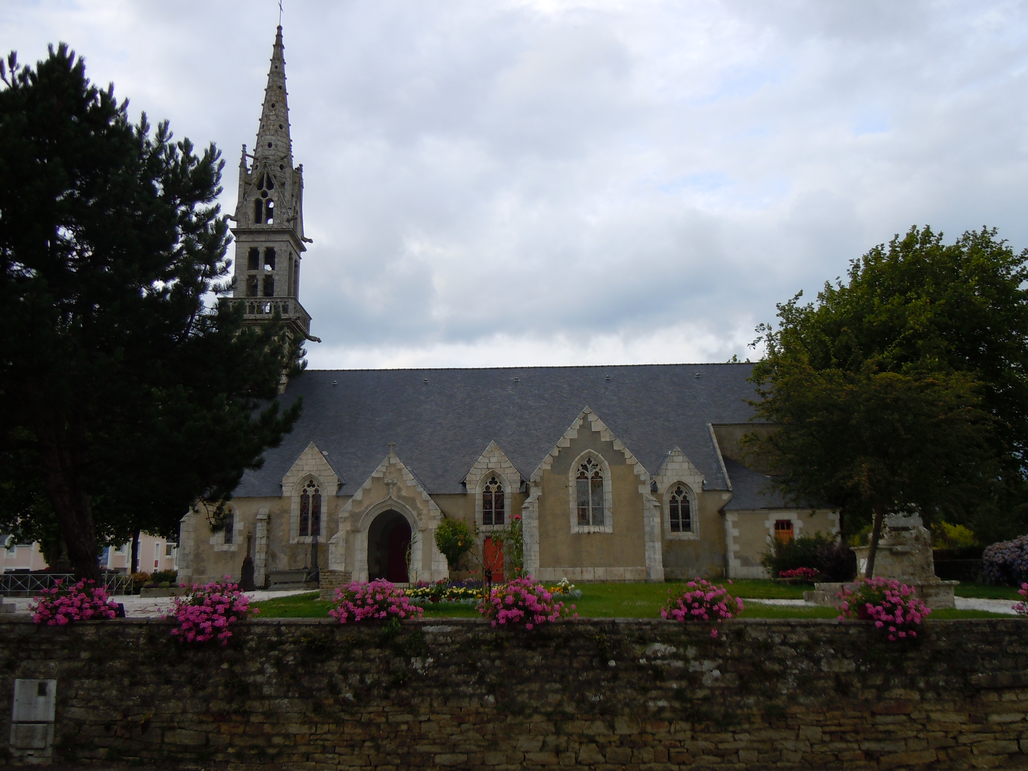 église Saint-Pierre-aux-Liens de Mellac, département du Finistère, France .